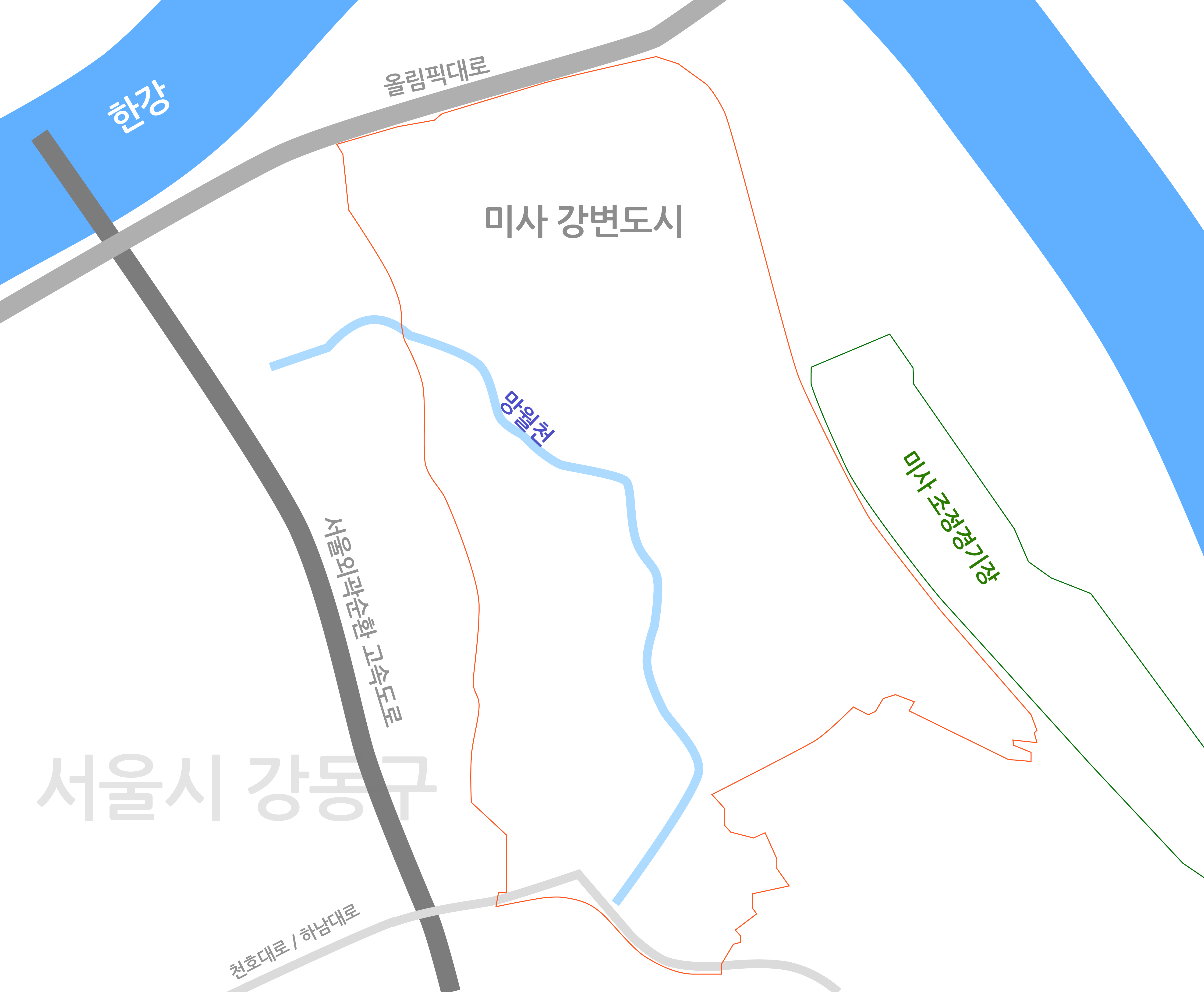 미사 강변도시